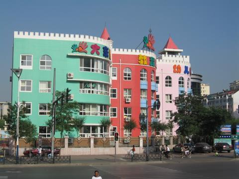 Ecole maternelle a Shenyang - da dong qu